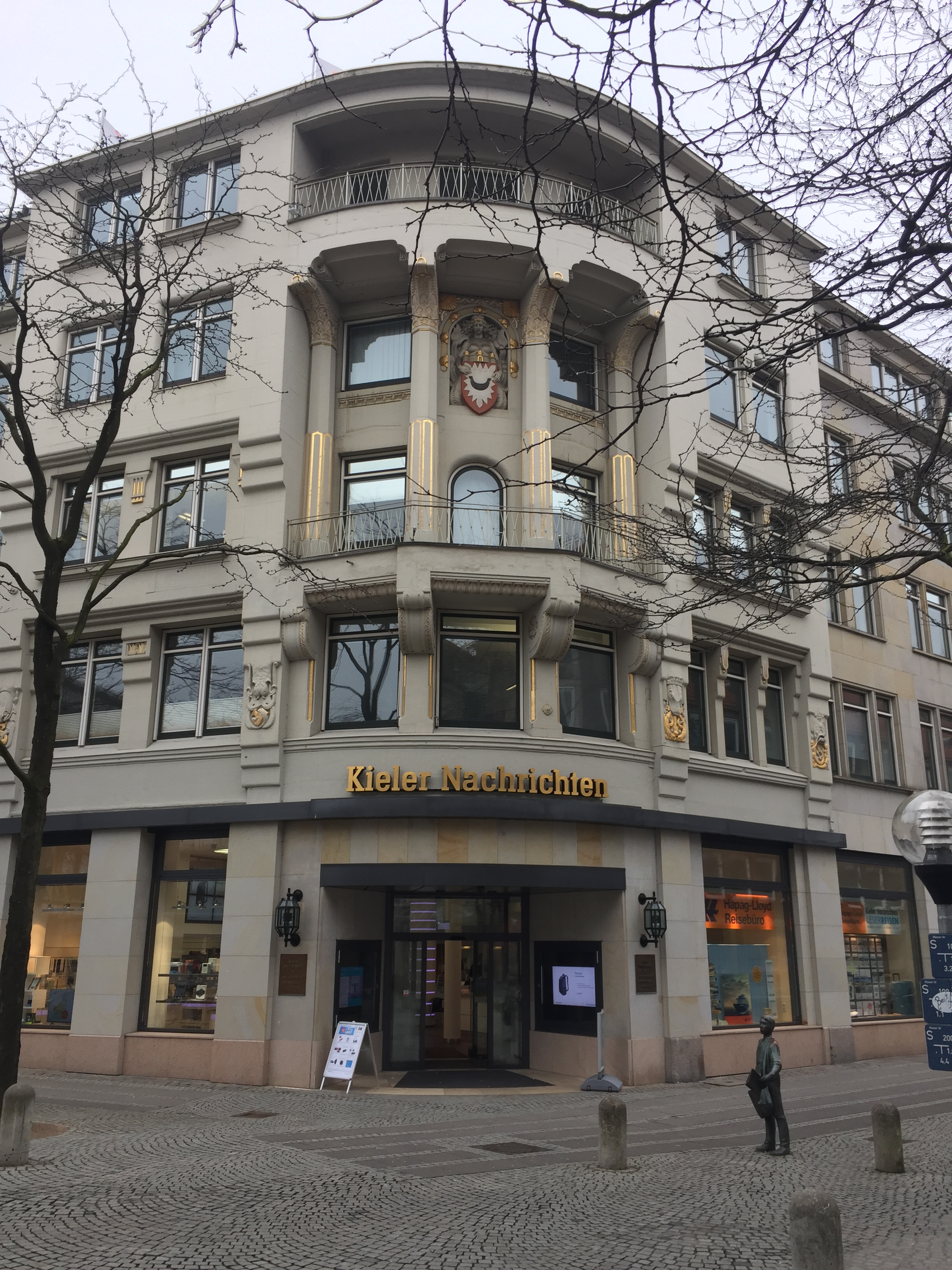 KN-Zentrale in Kiel